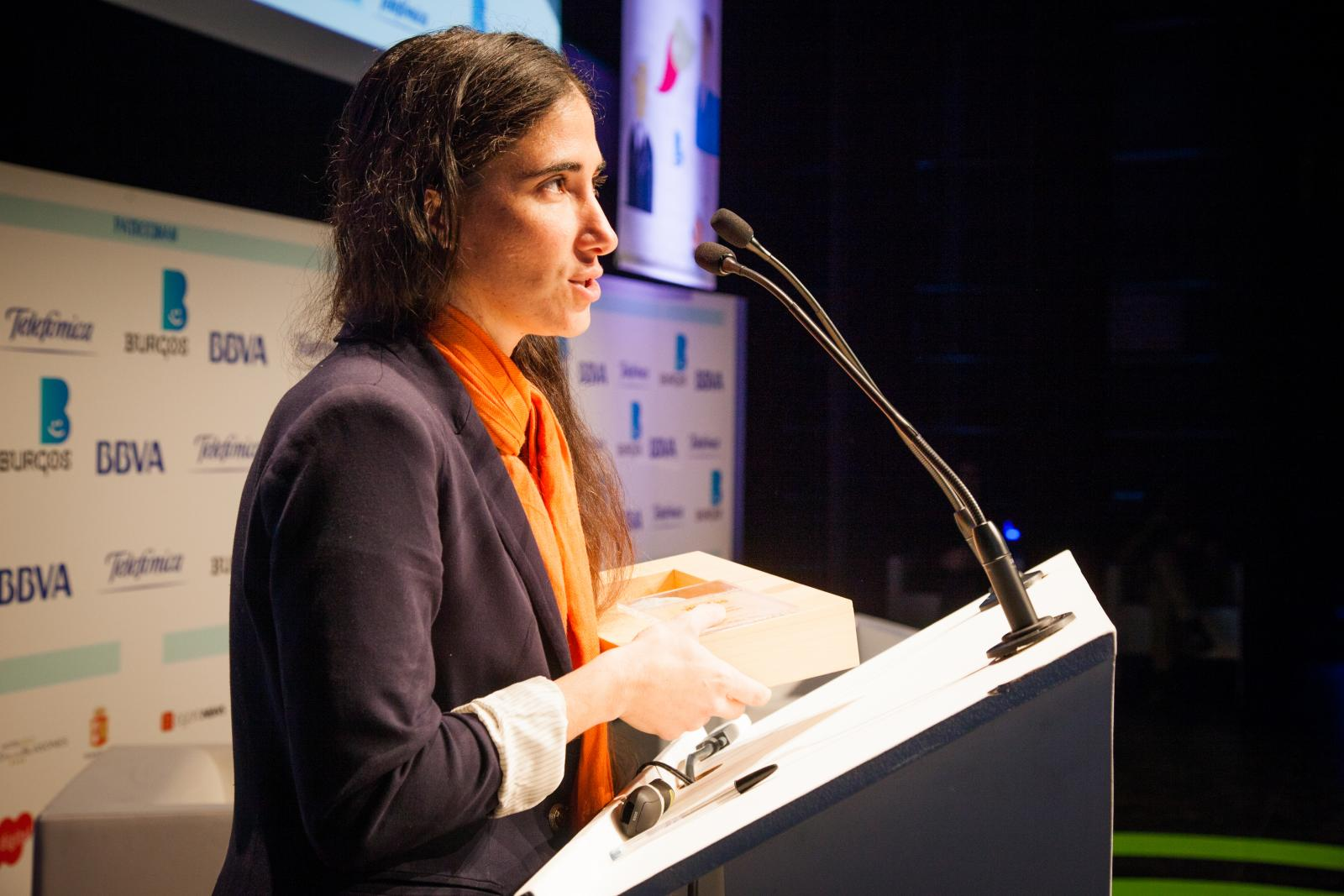 Fotos por Victoriano Izquierdo - @victorianoi